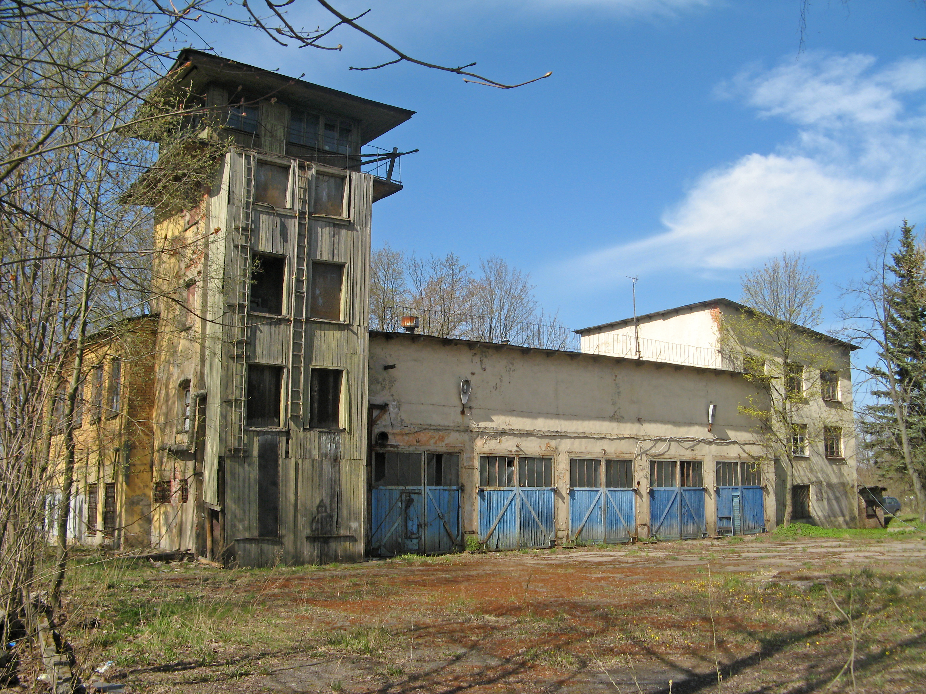 Санкт-Петербург, Капсюльное шоссе, 34, бывшая пожарная часть